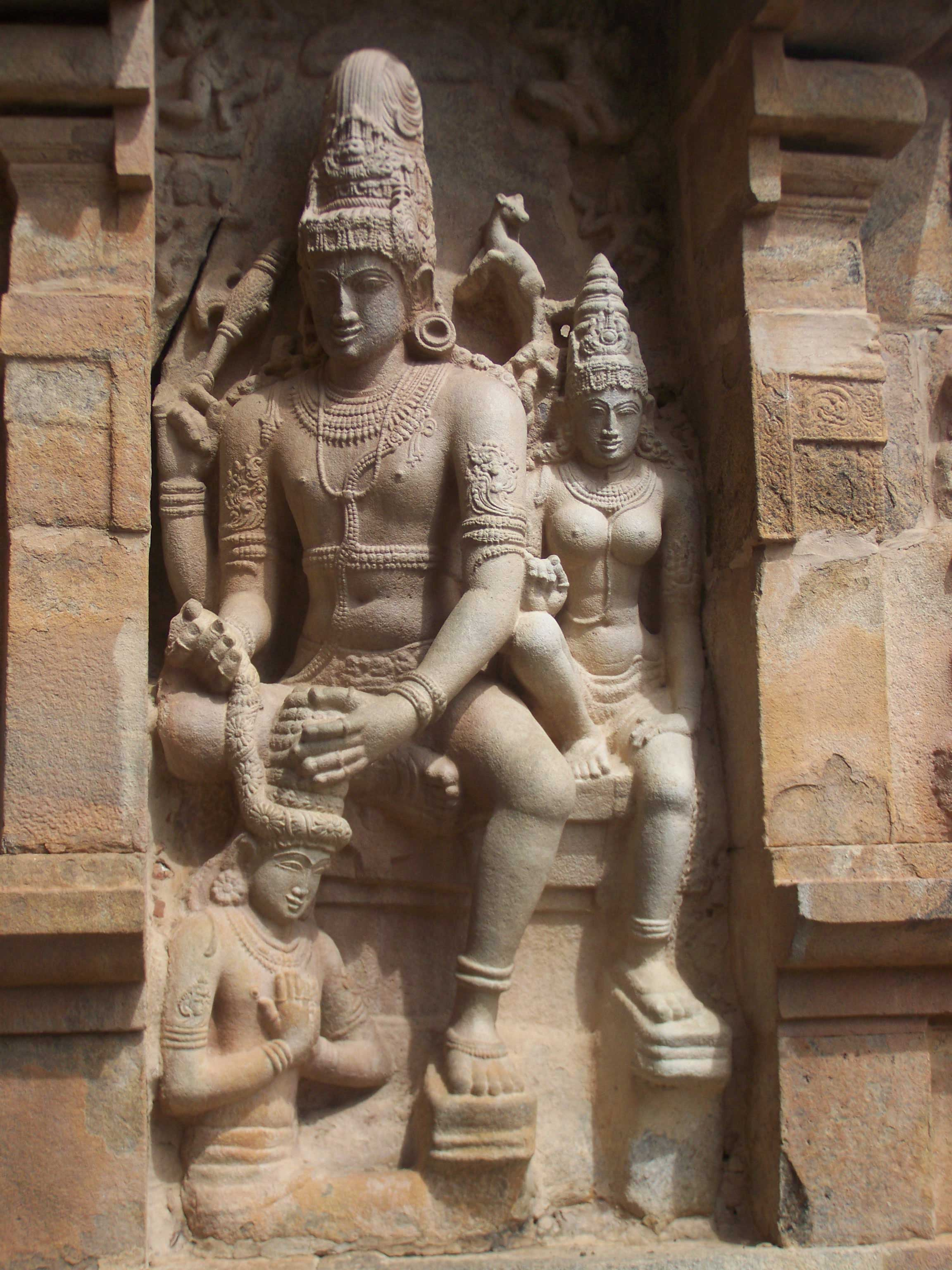 கோயிலில் உள்ள மிகவும் புகழ்பெற்ற சிற்பம். ஈசன் தன் பக்தனான சன்டேஸ்வரனுக்கு கிரீடம் சூட்டும் காட்சி. இறைவன் அருகே அன்னை உமாதேவி அமர்ந்துள்ளார்.